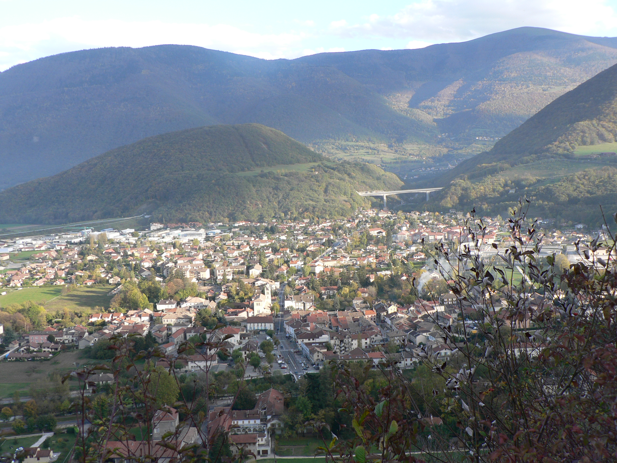 Vif vue depuis les flancs du Bémont